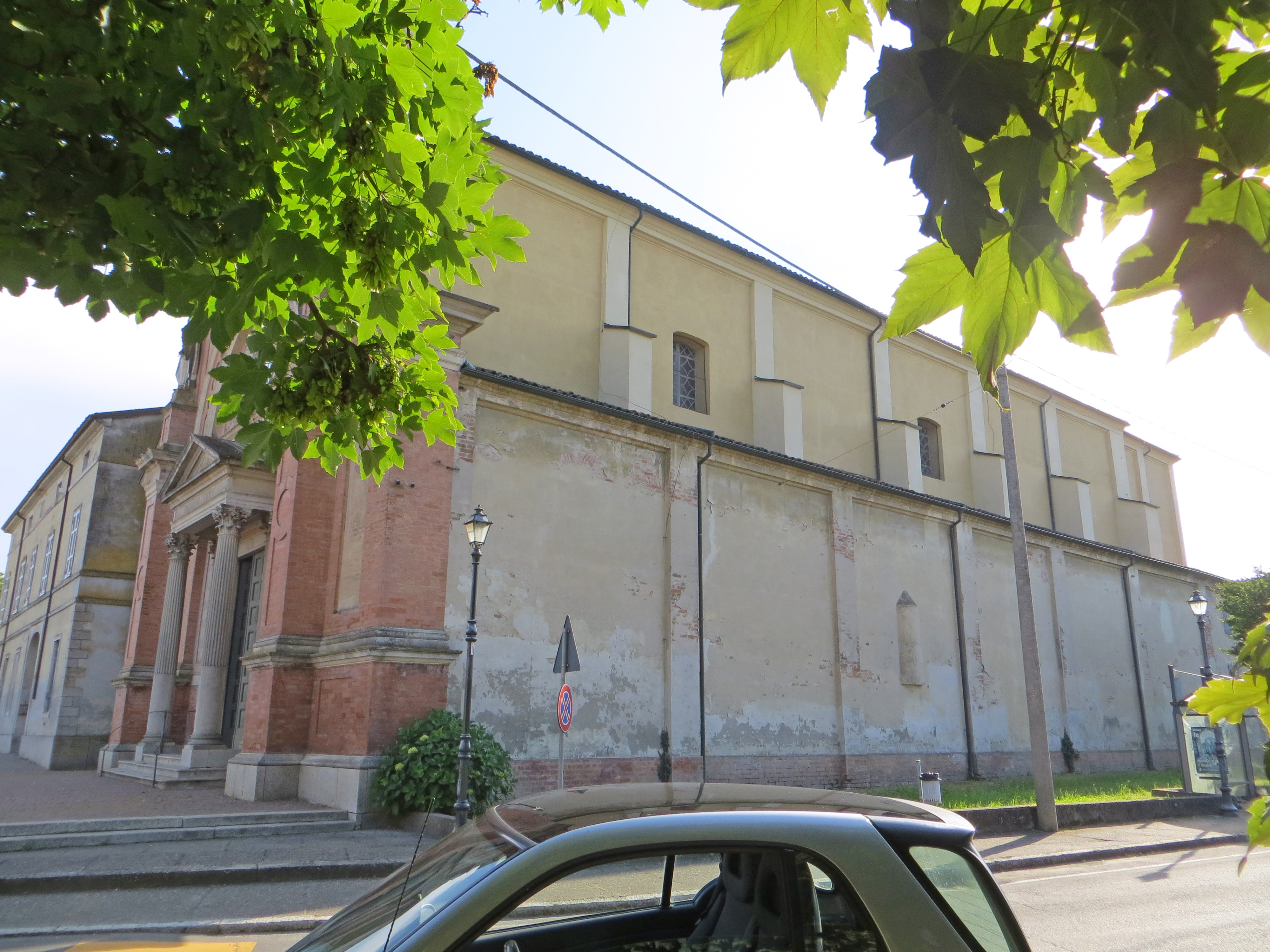 Collegiata di San Giovanni Battista (Pieveottoville, Polesine Zibello) - lato nord